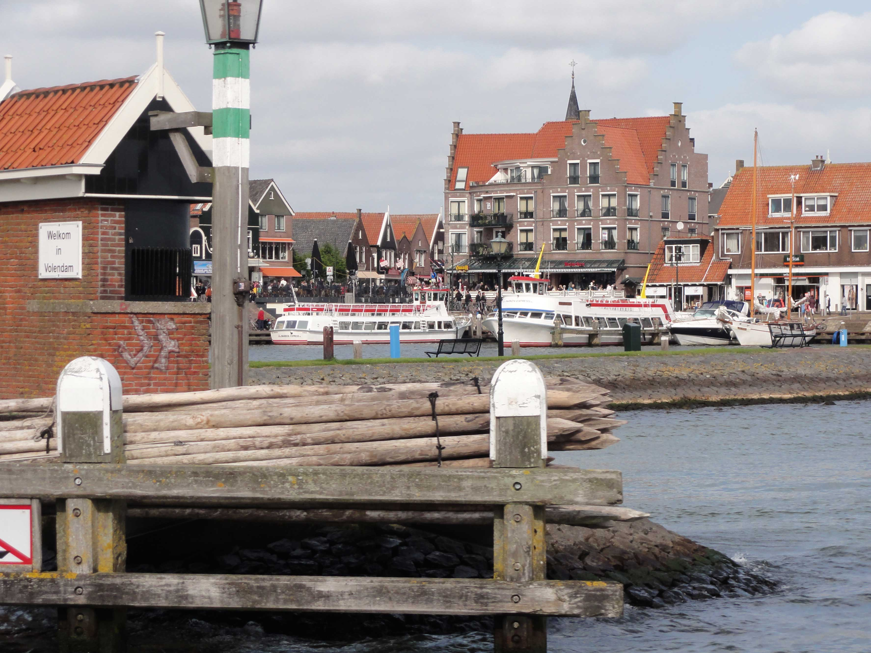 Molen de Kathammer nabij Volendam